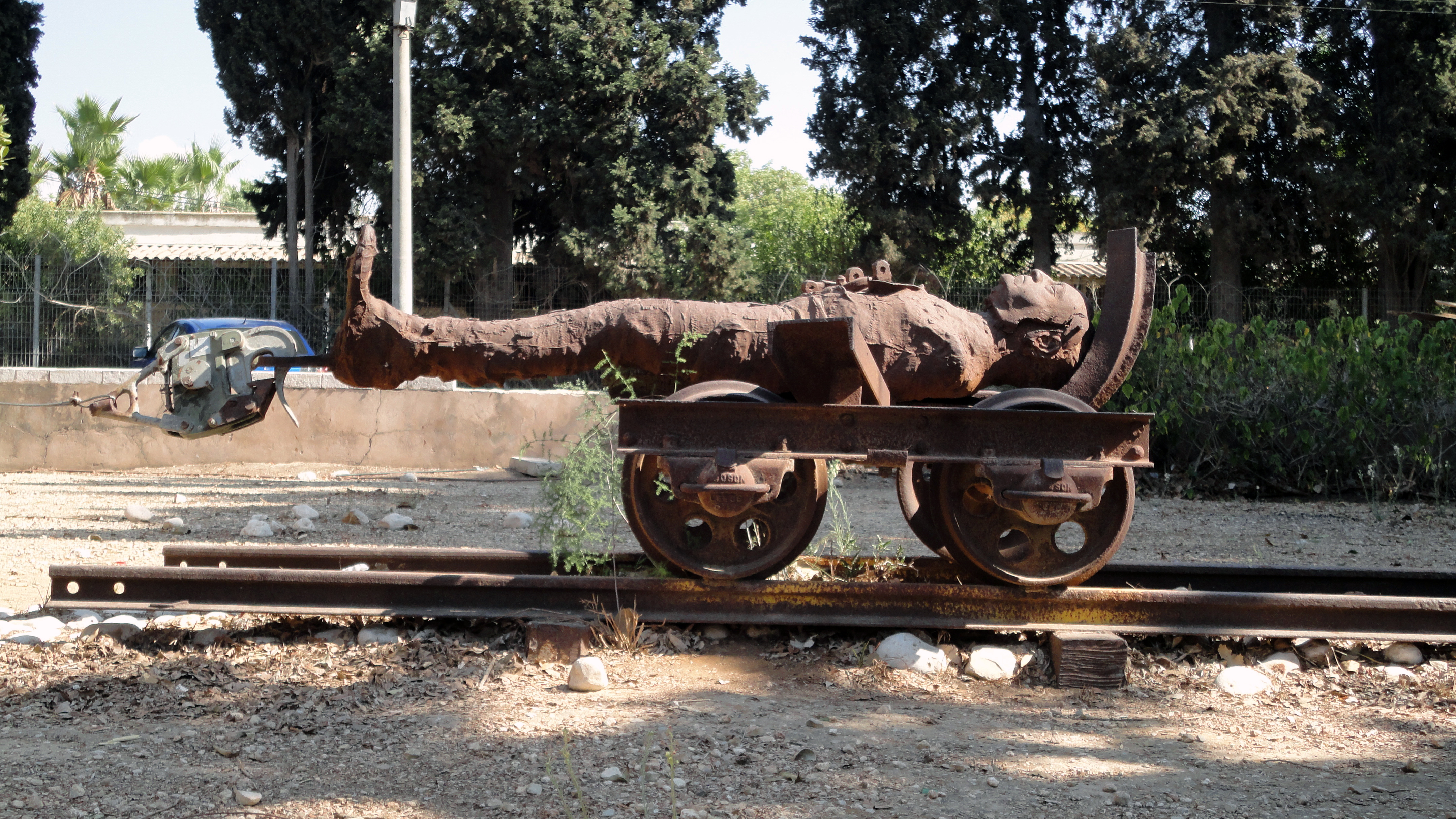 Sculpture